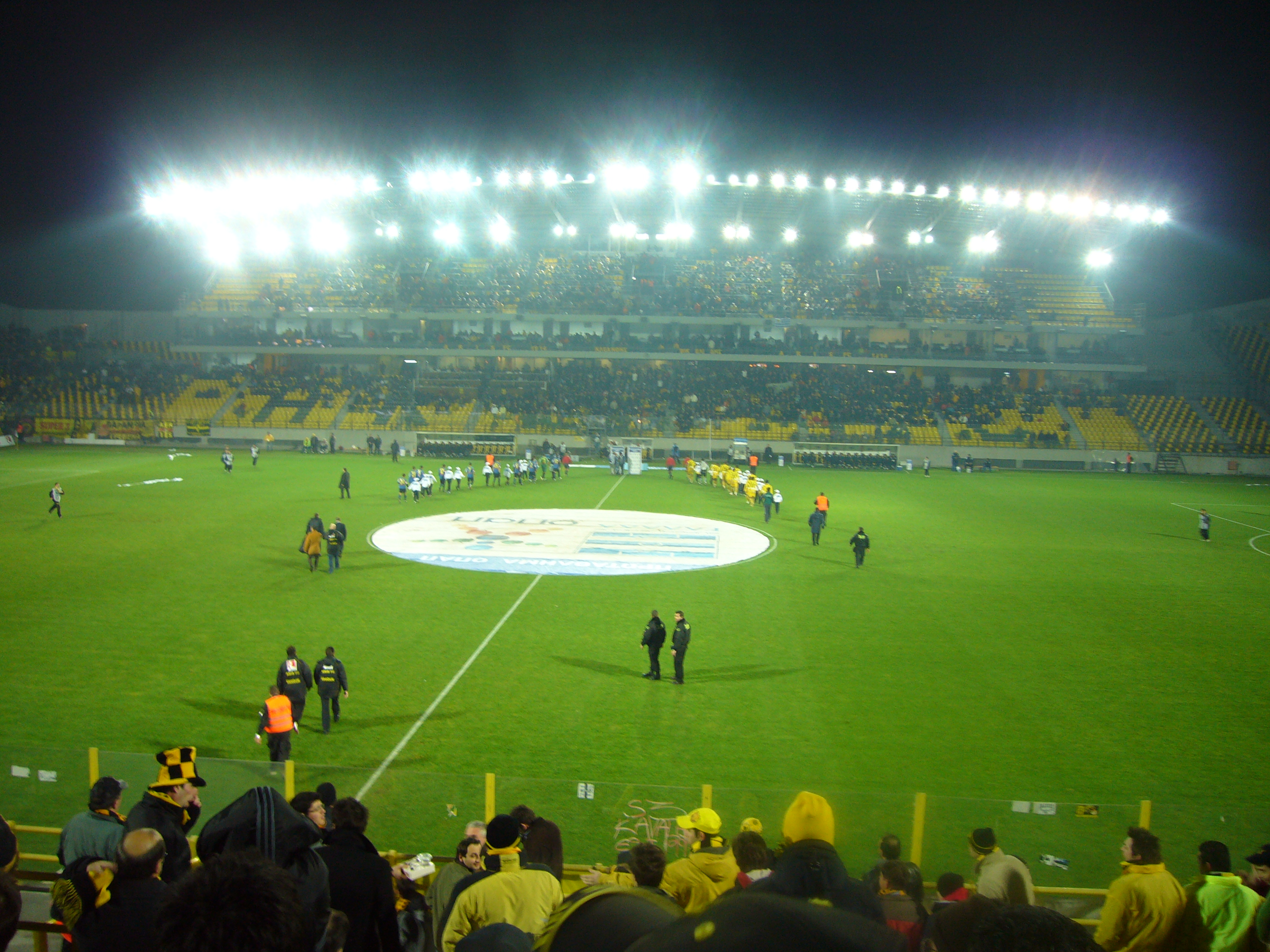 Mvskoke: ΚΛΕΑΝΘΗΣ ΒΙΚΕΛΙΔΗΣ